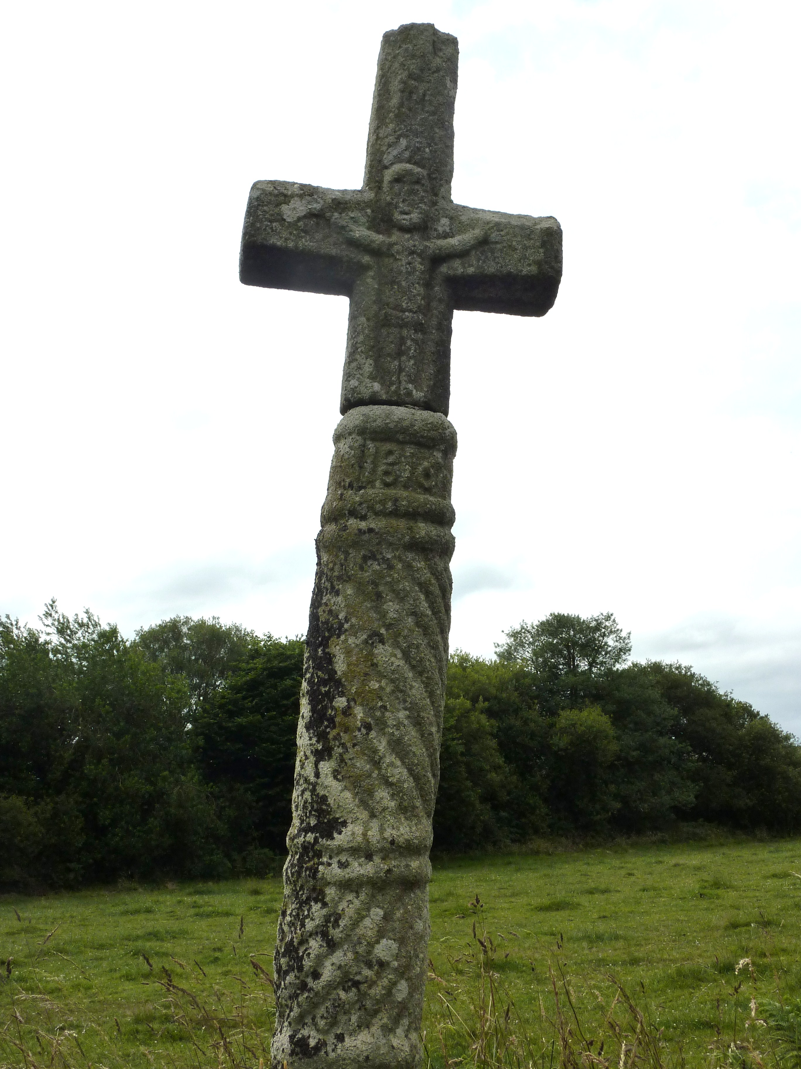 Scrignac: Calvaire de 1876 le long de la route menant à Coatquéau